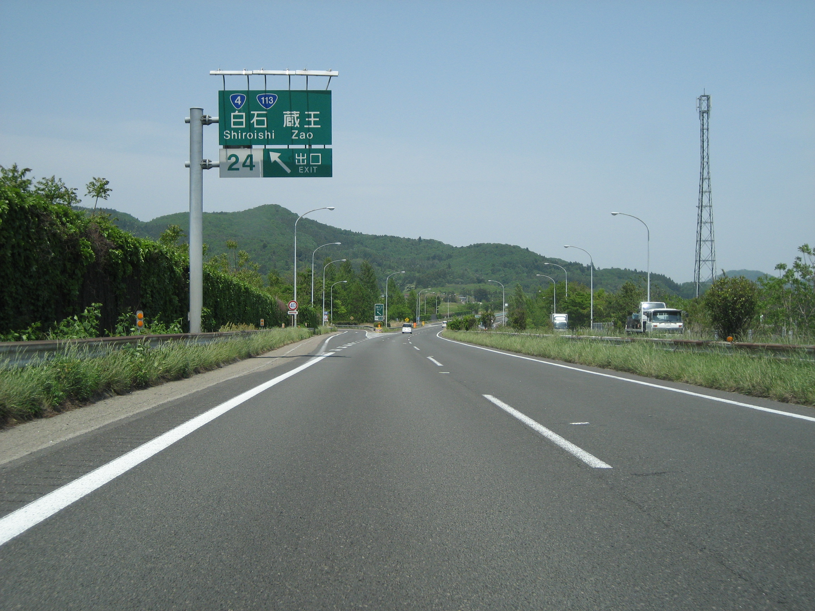 東北自動車道白石IC（下り出口分流付近）